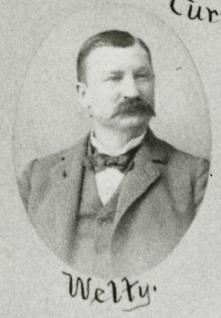 Rep G.M. Welty